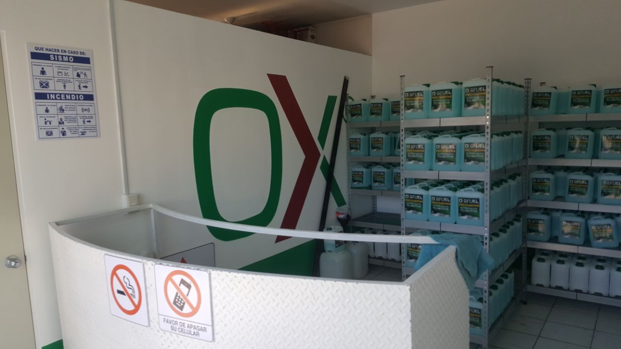 Expendio de venta de Oxifuel